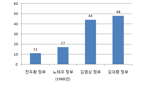 전두환 정부부터 김대중 정부까지 청와대에 출입이 허용된 언론사의 수